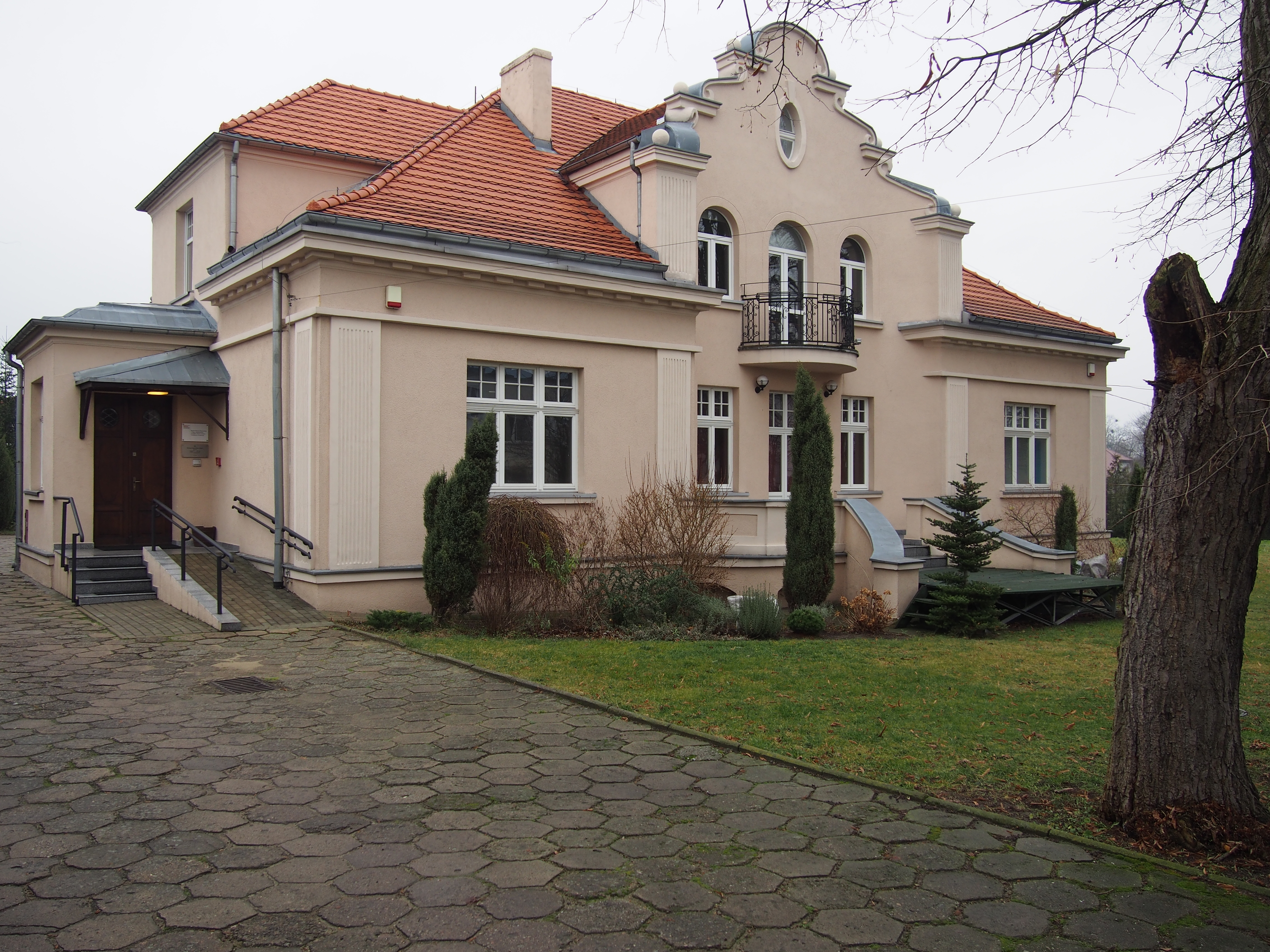 ul. Warszawska 53 w Słupcy.